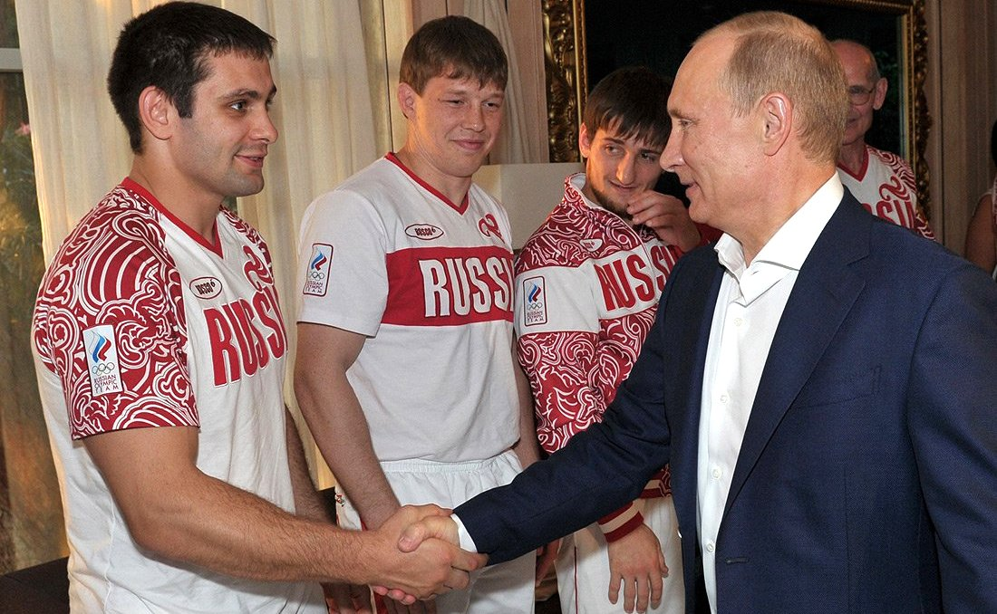 Олимпийская сборная России по дзюдо на встрече с Владимиром Путиным